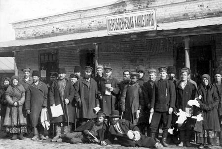 Переселенческая канцелярия.